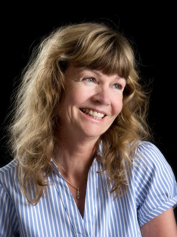 The Swedish author and poet Maria Möller in 2015. Permission for publication of this picture was given by the photographer working at "Fotograf Anna & Maria".